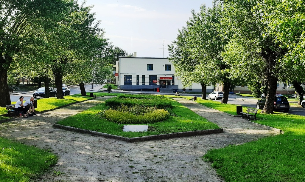 Skwer po byłym ratuszu w Braniewie